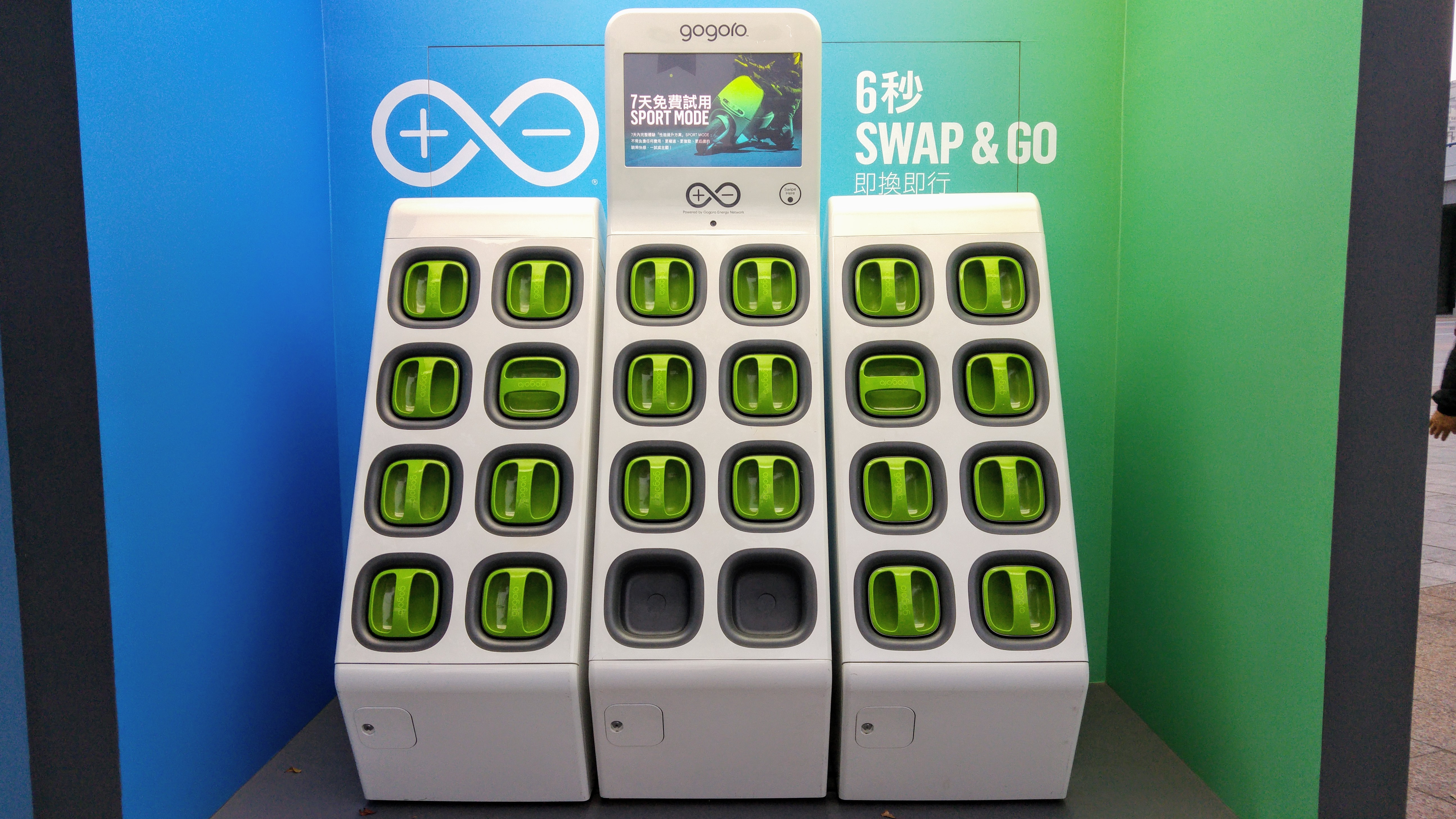 Gogoro 1 Series 上市初期所展示的 GoStation 機台，可供 Gogoro 載具進行電池能源交換。